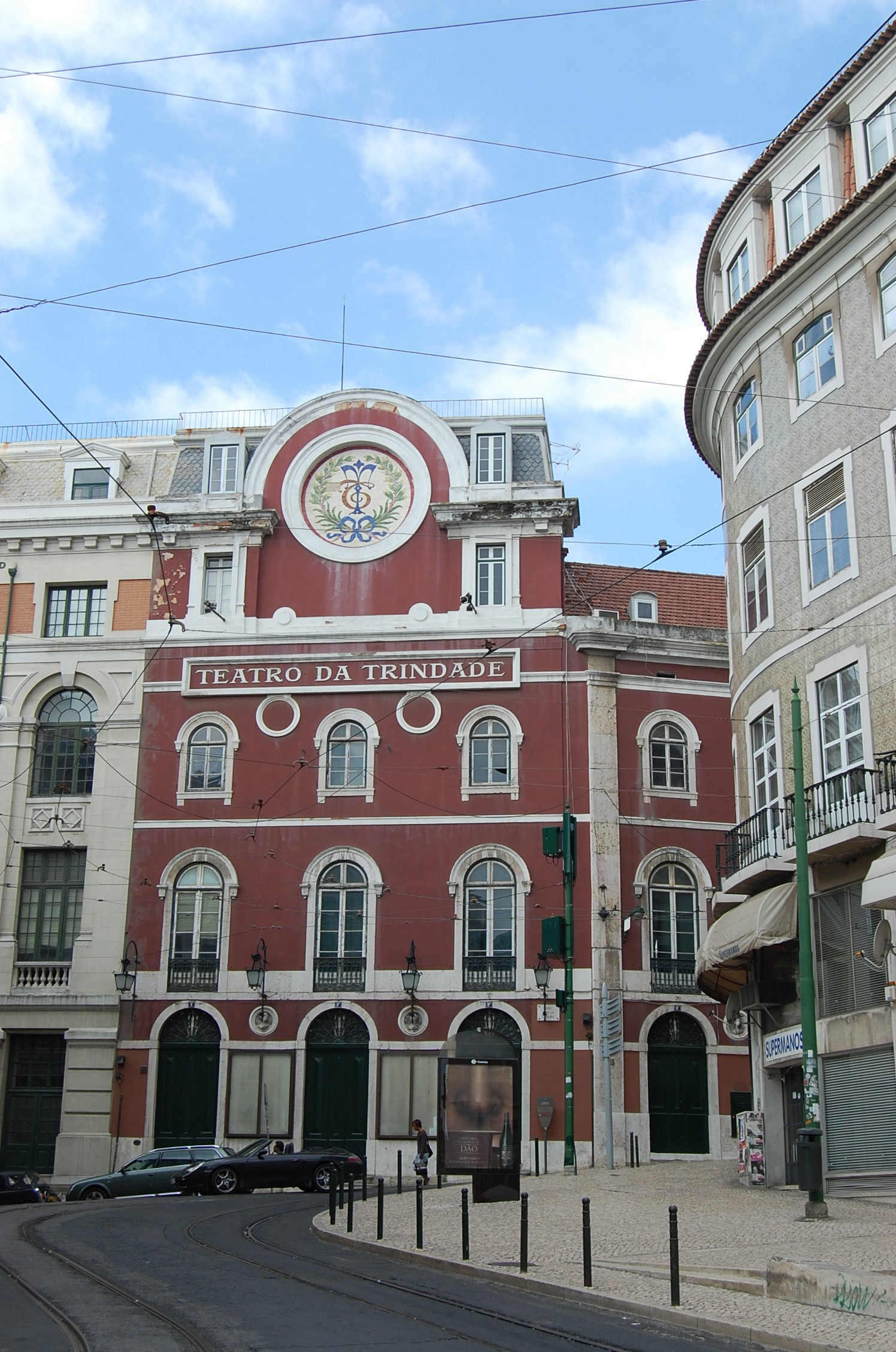 Teatro da Trindade, Lisboa Portugal.